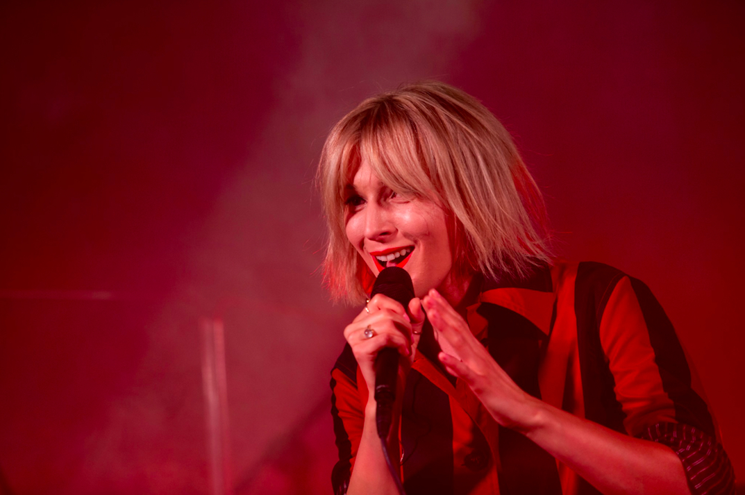 koncert Meli Koteluk na gali plebiscytu "Nieprzeciętni 2019" Czwórki Polskiego Radia